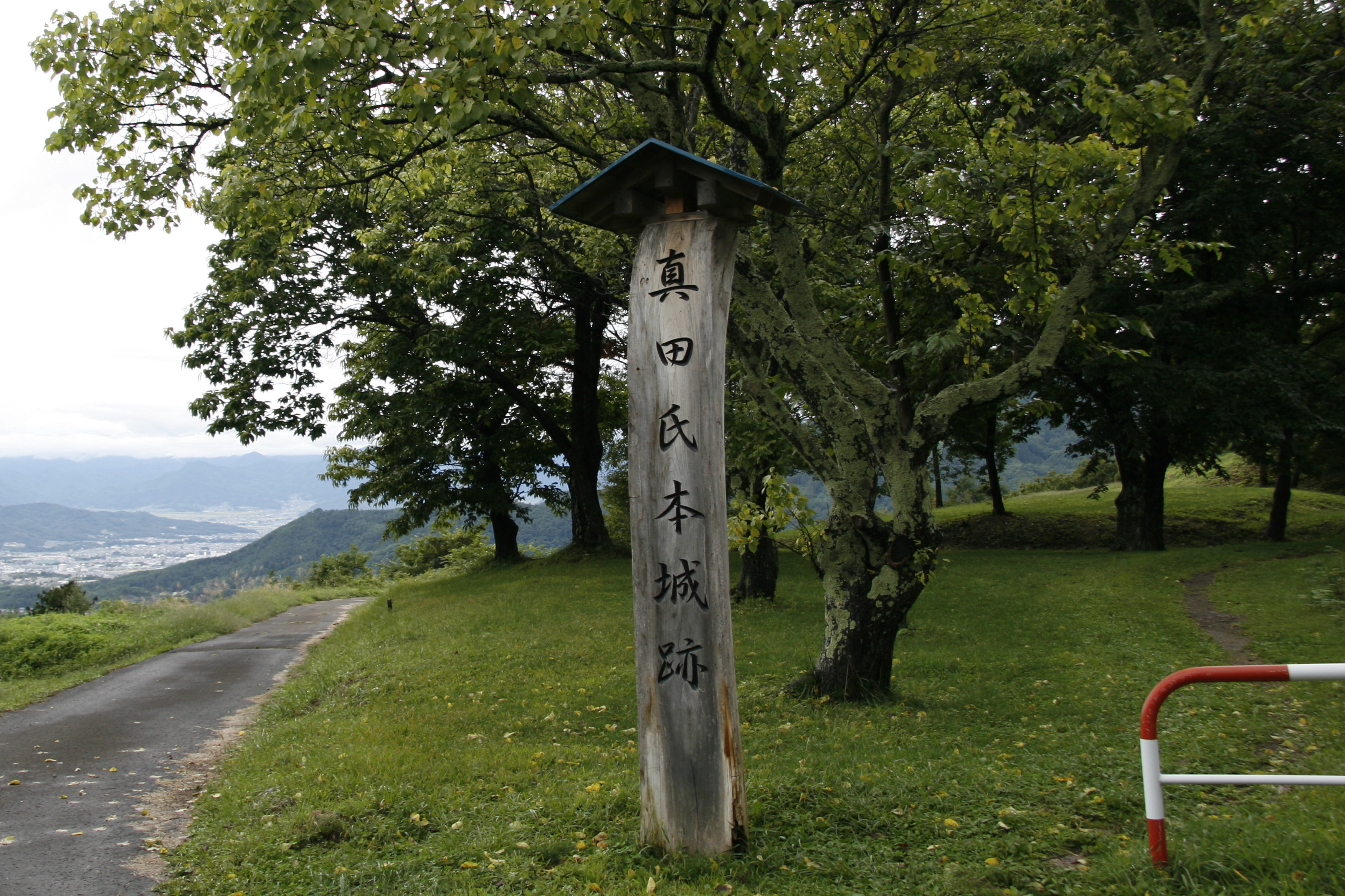 真田本城（松尾城）